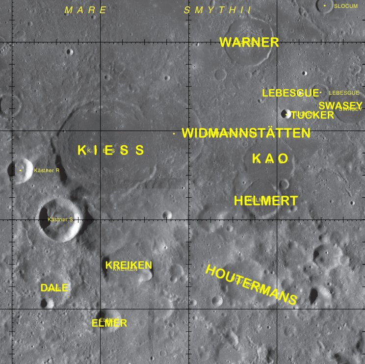 Cráter lunar Houtermans. (Imagen LRO)